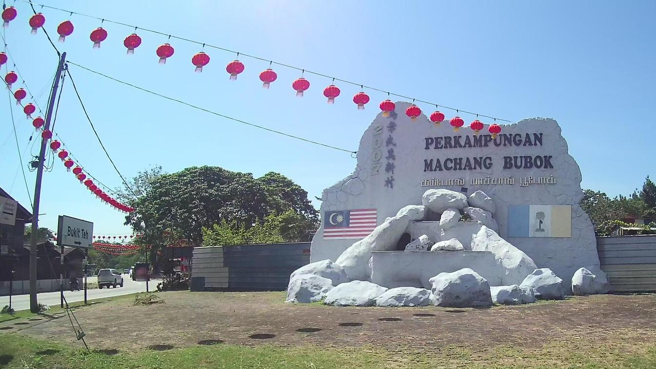 Machang Bubuk